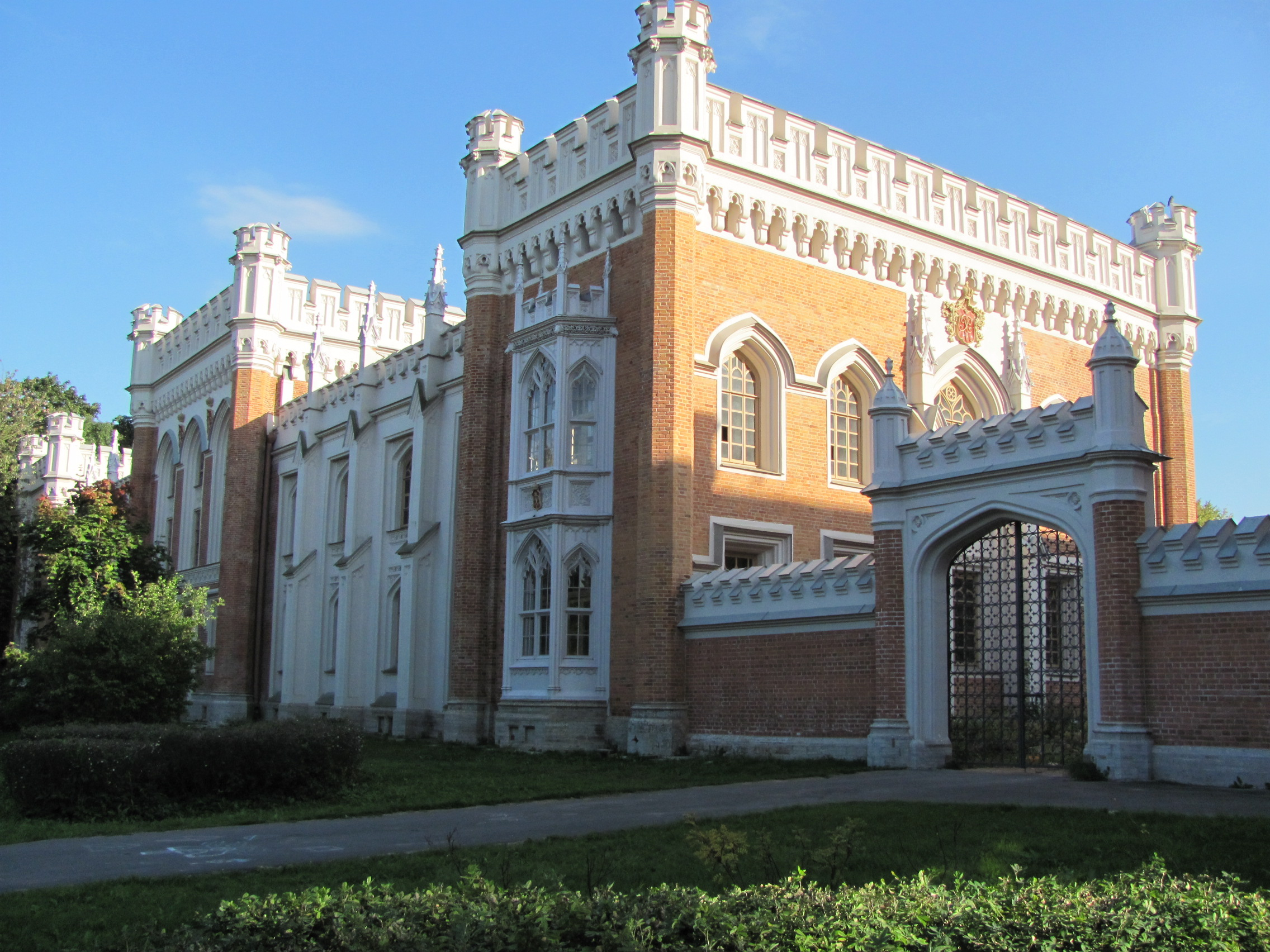 Конюшни дворцовые (Санкт-Петербург и Лен.область, Петергоф, Аврова улица, 2, корпус 1, 2, 3, 4, 5)